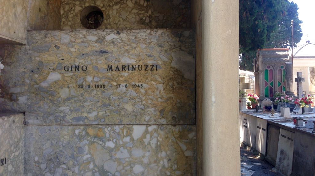 La tomba di Gino Marinuzzi, nel cimitero monumentale di San Remo. Il direttore e compositore aveva vissuto nella cittadina ligure i momenti di pace dalla sua intensa carriera.